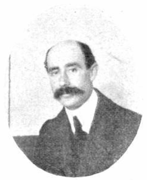 José María Salaverría en Buenos Aires hacia 1909.